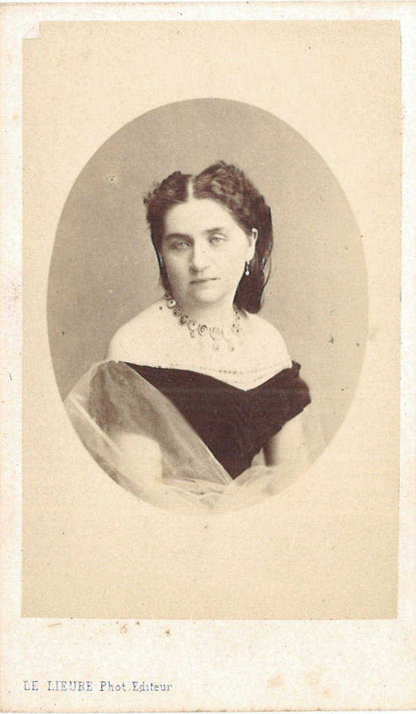 Carolina Ferni (1846-1926)